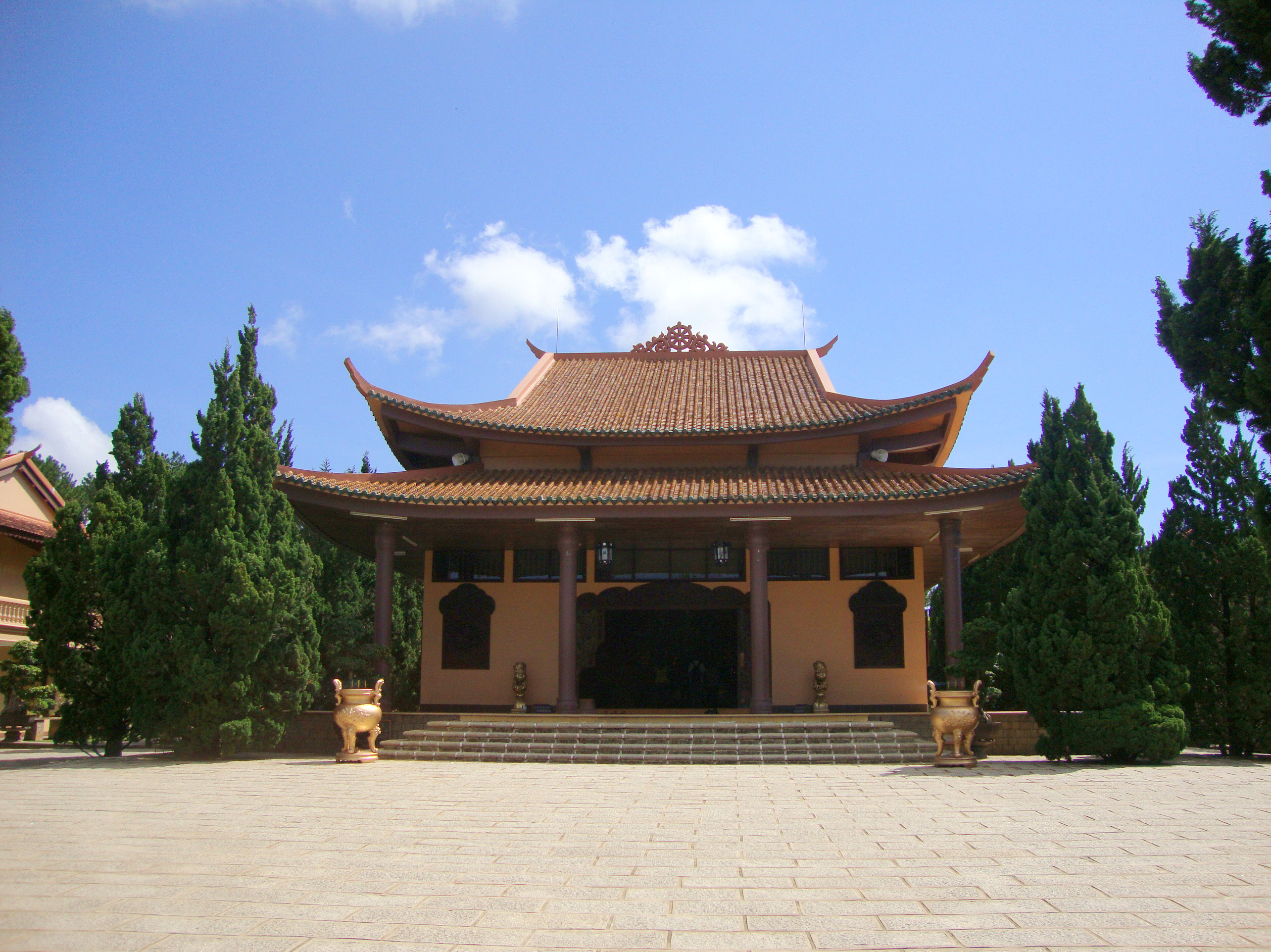 Chính điện thiền viện Trúc Lâm, Đà Lạt